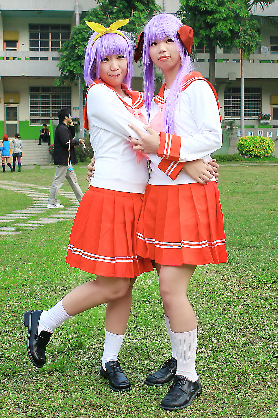 《幸運☆星》柊司（左）與柊鏡（右）cosplayer。